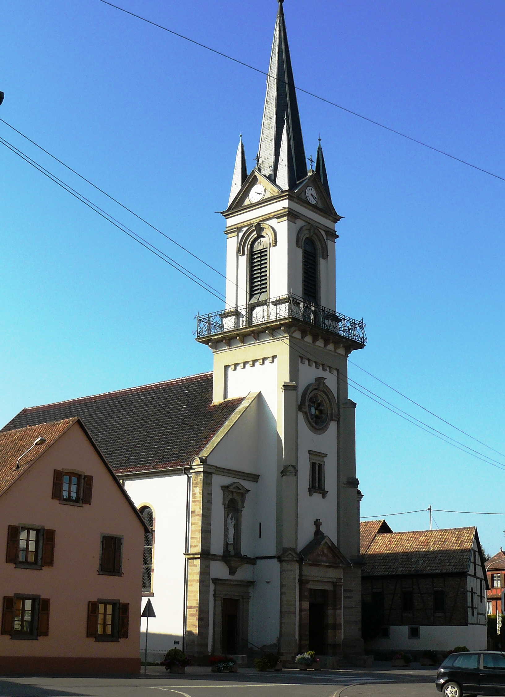 Eglise catholique Saint-Oswald